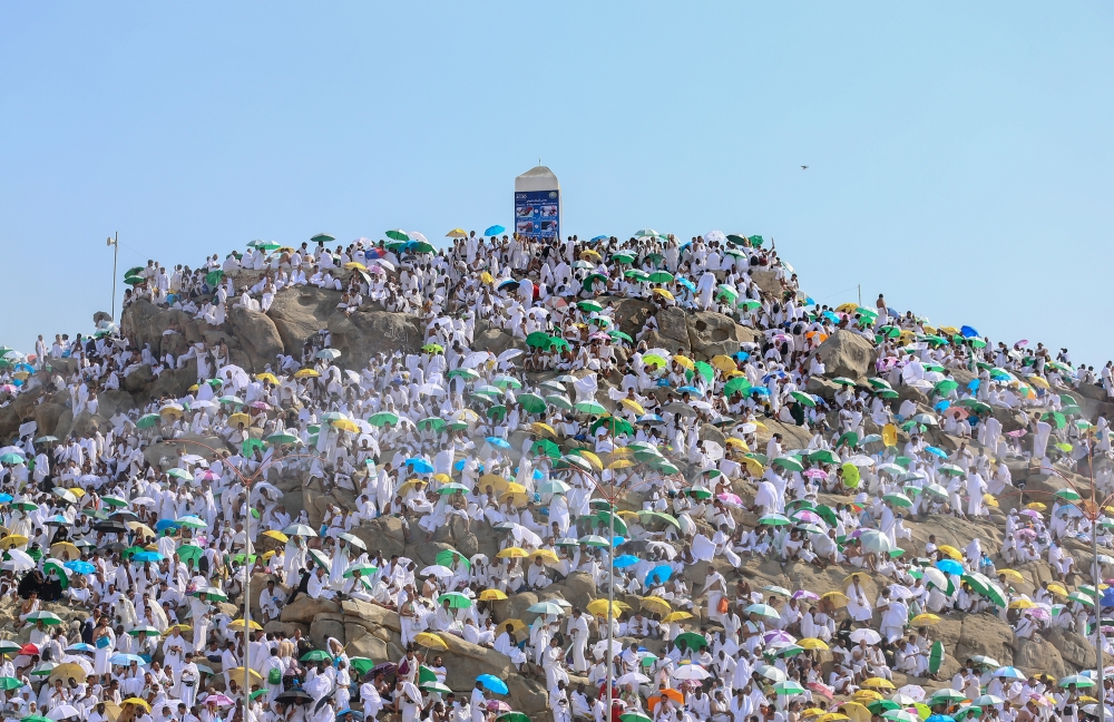 جبل الرحمة بمشعر عرفات بمكة المكرمة